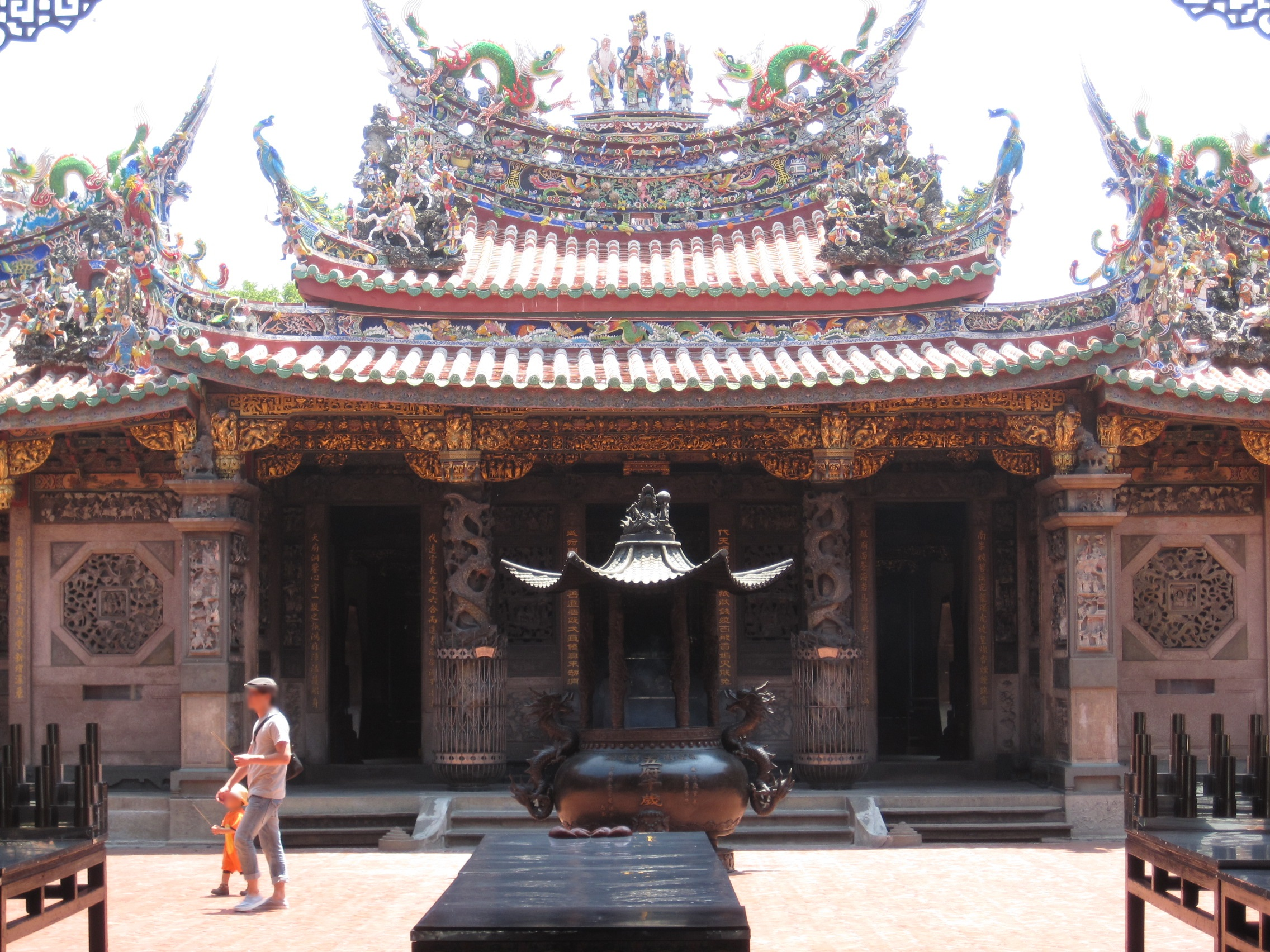 南鯤鯓代天府古蹟本體